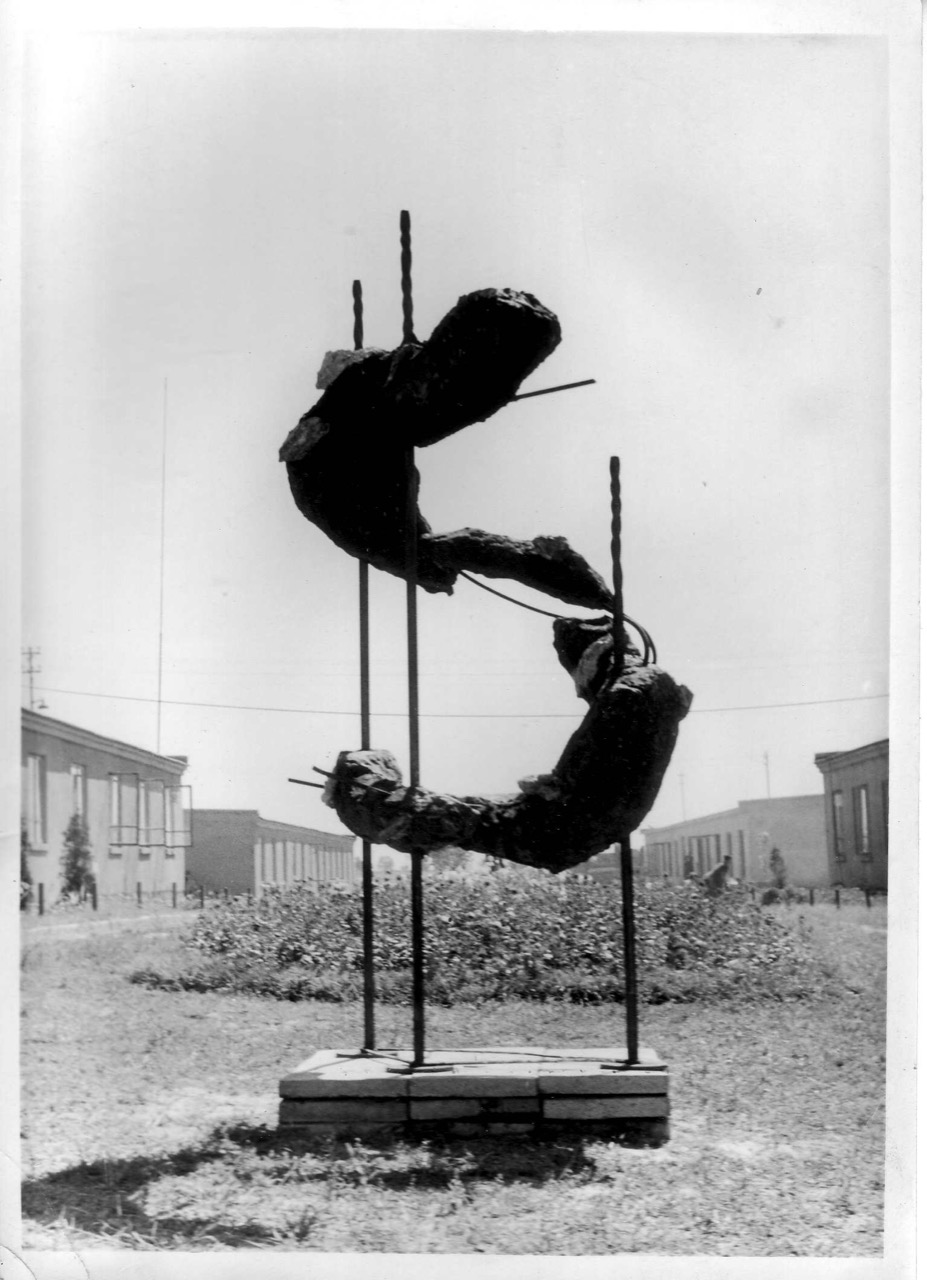 Magdalena Więcek, S Symbol Siarki, 1962, beton, stal, wysokość 300 cm